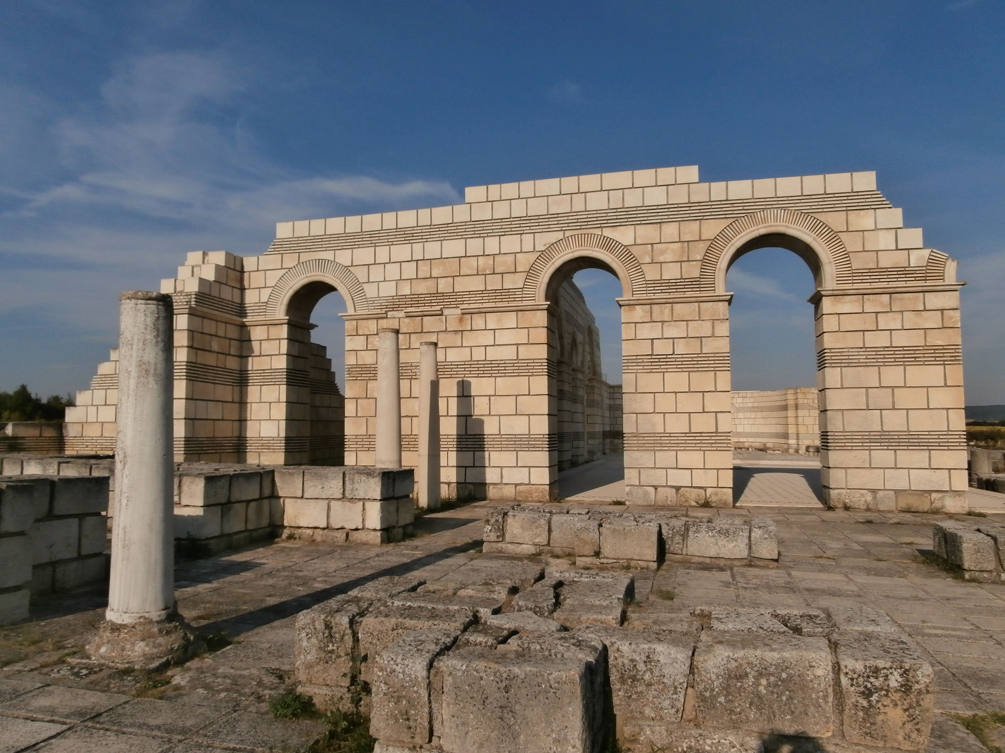 Дворцова църква Плиска